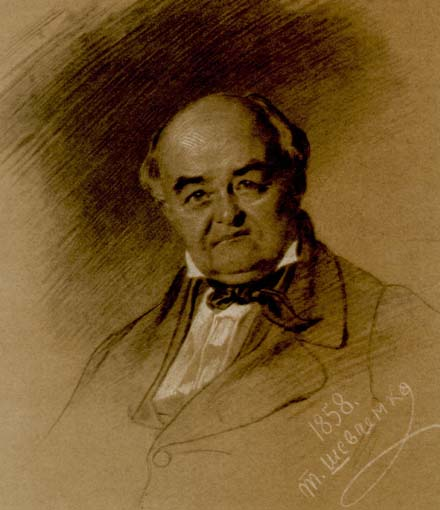 Портрет М.С.Щепкіна (Папір, італійський олівець, крейда)